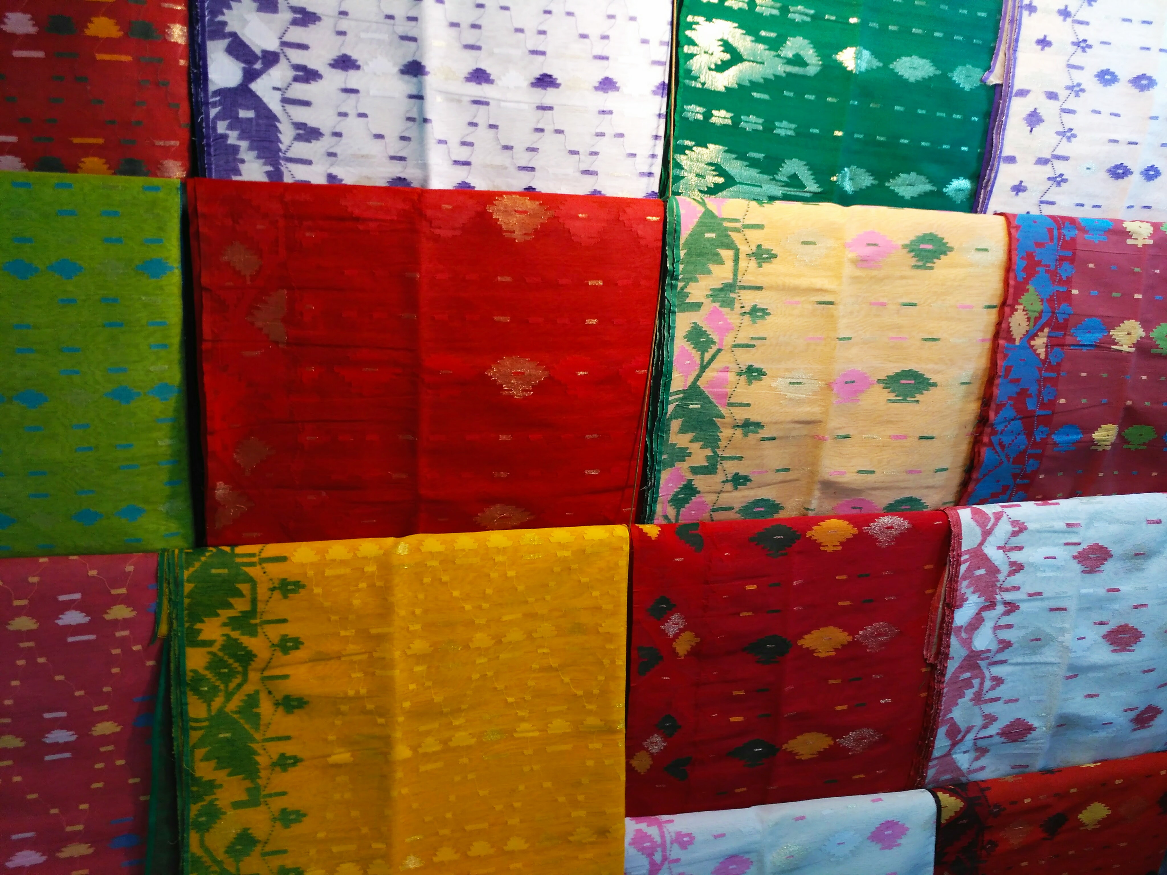 সোনারগাঁ কারুশিল্প বিক্রয়কেন্দ্রের একটি দোকানে বিক্রয়ের জন্য প্রদর্শিত জামদানি শাড়ী